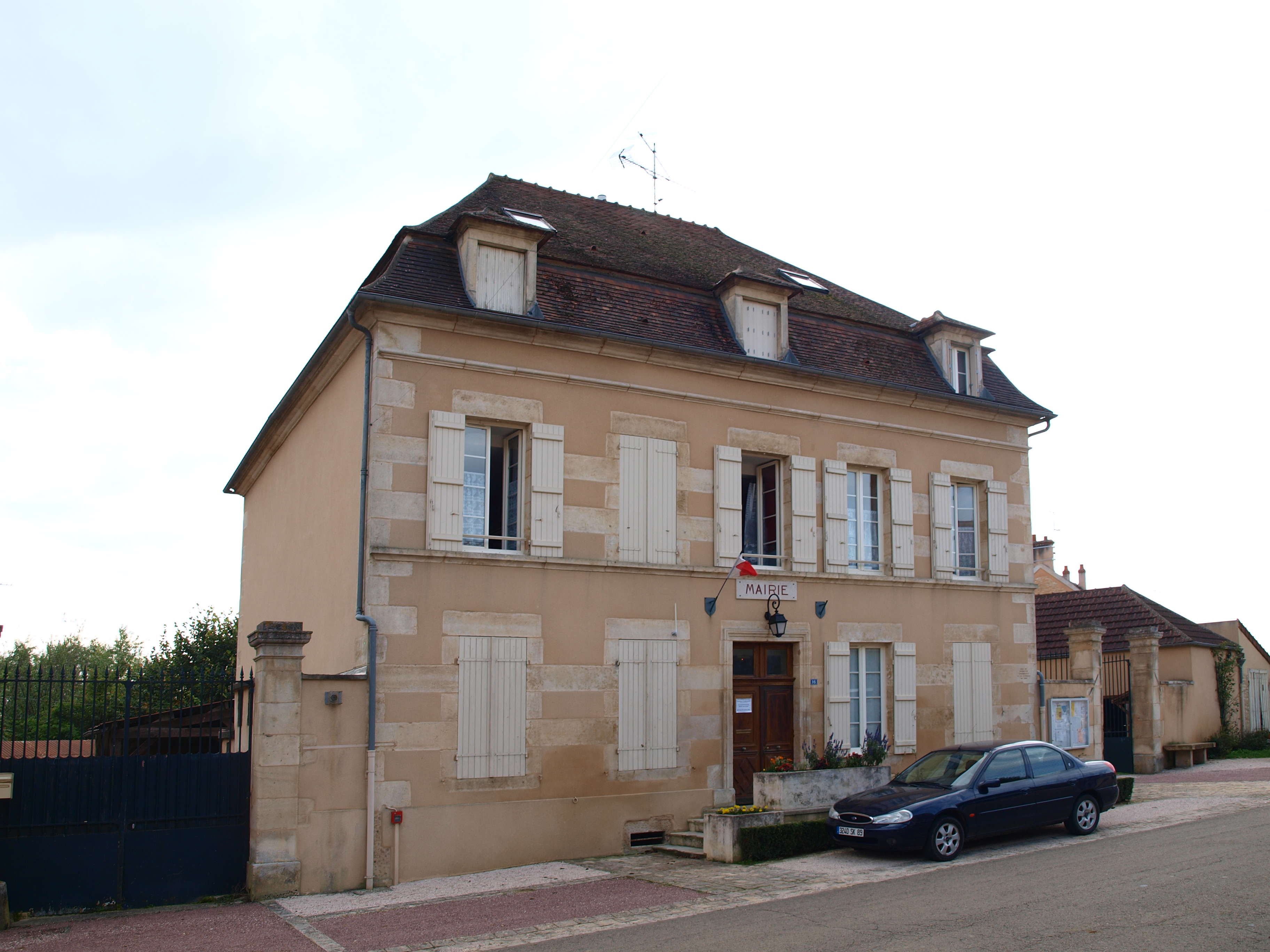 Étaule (Yonne, France) ; hameau de Wassy, la mairie de la commune.